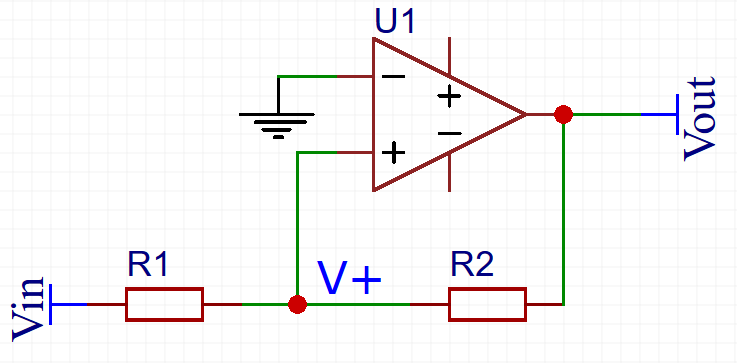 Sümmeetriliste lävenditega mitteinverteeriv Schmitt Trigger